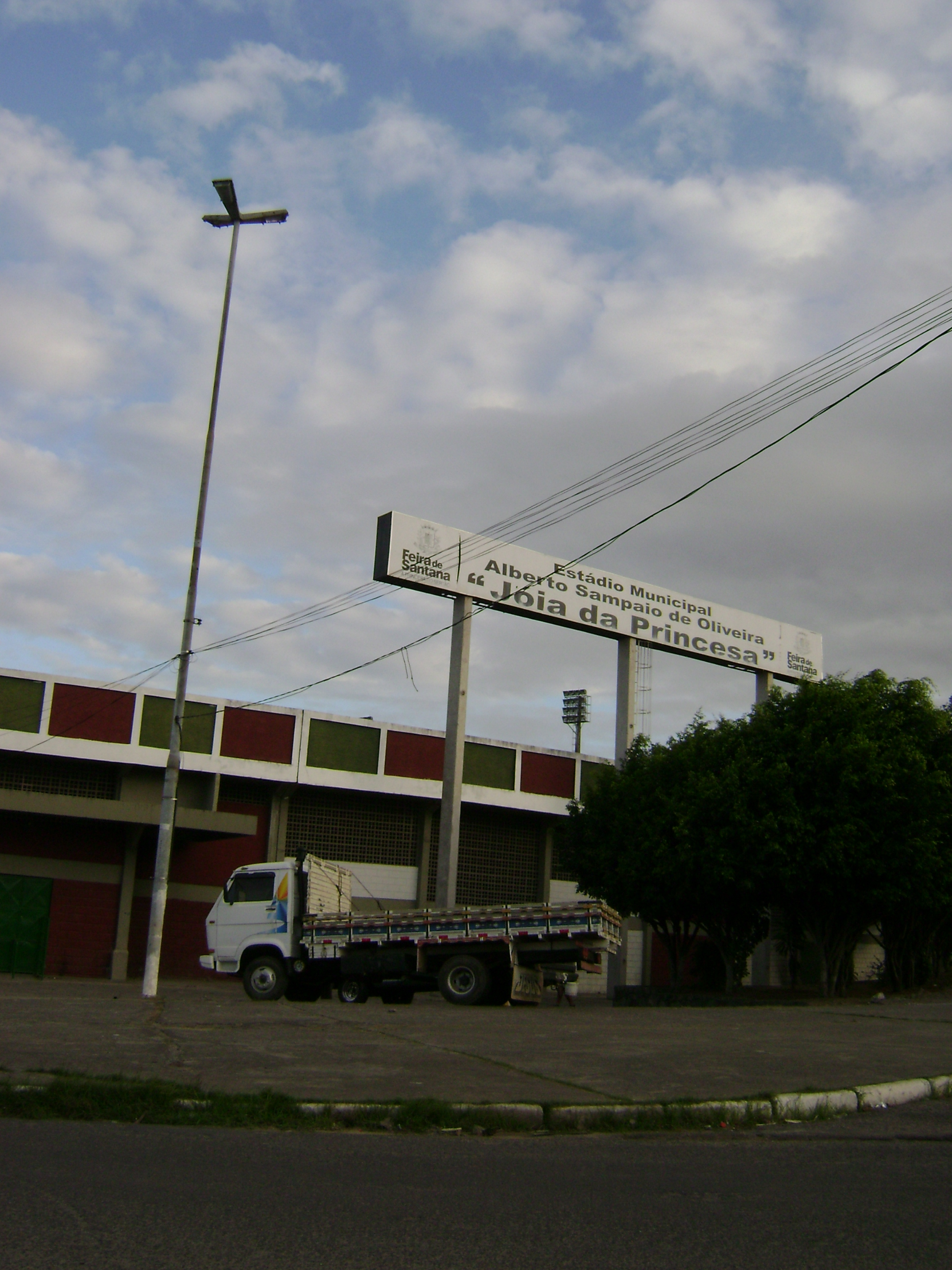 Estádio Joia da Princesa, em Feira de Santana.